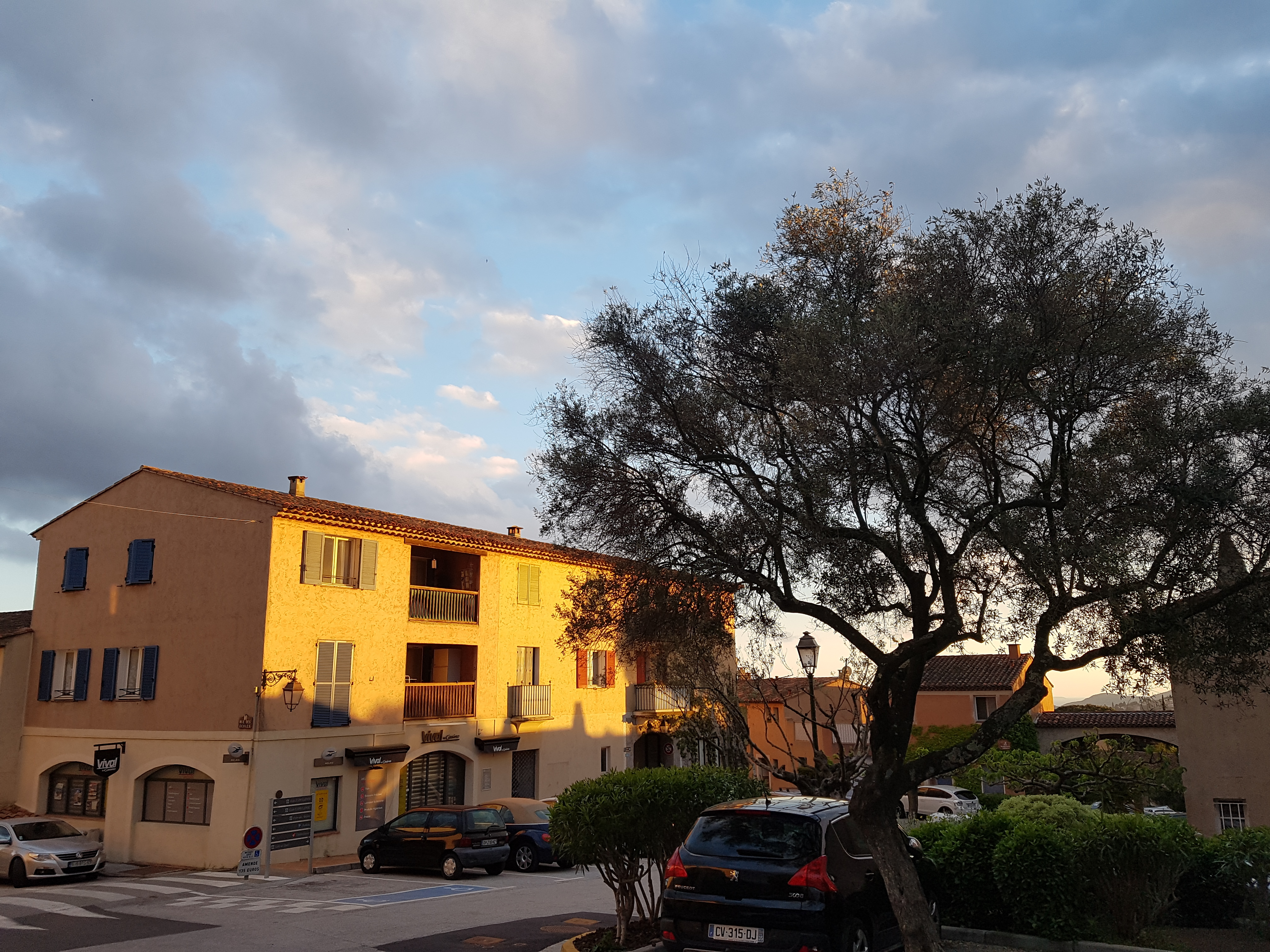 Vue du nouveau village de Gassin au coucher de soleil depuis le nord